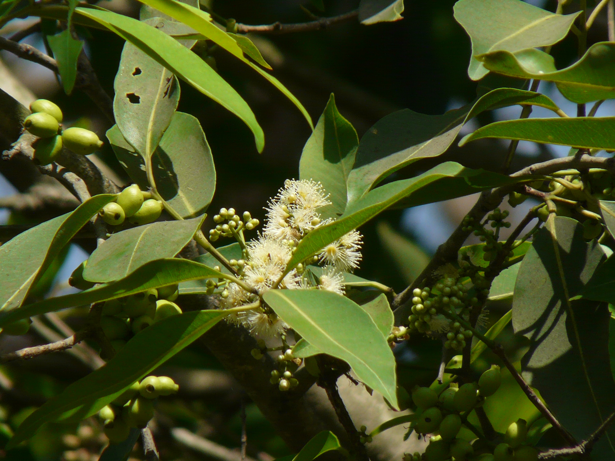 Myrtaceae (Myrtle family) » Syzygium cumini siz-ZY-gee-um -- from the Greek syzygos (joined), referring to the paired leaves KOO-min-ee -- from the Greek kyminon (cumin) commonly known as: black plum, damson plum, duhat plum, Indian blackberry, jambolan, jambolan plum, Java plum, Malabar plum, Portuguese plum • Assamese: জামু jamu, ক'লা জামু kala jamu • Bengali: kala jam • Gujarati: જાંબુ jaambu • Hindi: जामुन jamun • Jaintia: dieng sohthongum • Kannada: ನೇರಳೆ nerale • Khasi: dieng ramai • Konkani: जांबुळ jambul • Malayalam: കാട്ടുചാമ്പ kaattucaampa, ഞാവല്‍ njaaval, ഞാറ njaara, പെരിഞാറ perinjaara • Manipuri: gulamchat, jam • Marathi: जांबूळ jambool • Mizo: hmuipui • Nepalese: जामुनु jamunu, फँड़िर् phanrir • Oriya: jamkoli • Pali: जम्बु jambu • Prakrit: जम्वुलो jambulo, जम्मुलो jammulo • Punjabi: ਜਾਮਣ jaman • Sanskrit: जम्बुलः jambulah, मेघमोदिनी meghamodini • Tamil: கொட்டைநாகம் kottai-nakam, நாவல் naval • Telugu: నేరేడు neredu • Tibetan: dzam-bu • Urdu: جامن jaman Native to: India and Indonesia References: Flowers of India • Top Tropicals • Dave's Garden • M.M.P.N.D. • DDSA